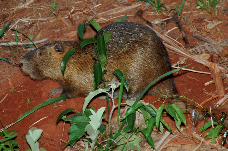 Ratao do banhado (Ratão do banhado) Filo: Chordata Classe: Mammalia Ordem: Rodentia Família: Myocastoridae Espécie: Myocastor coypus